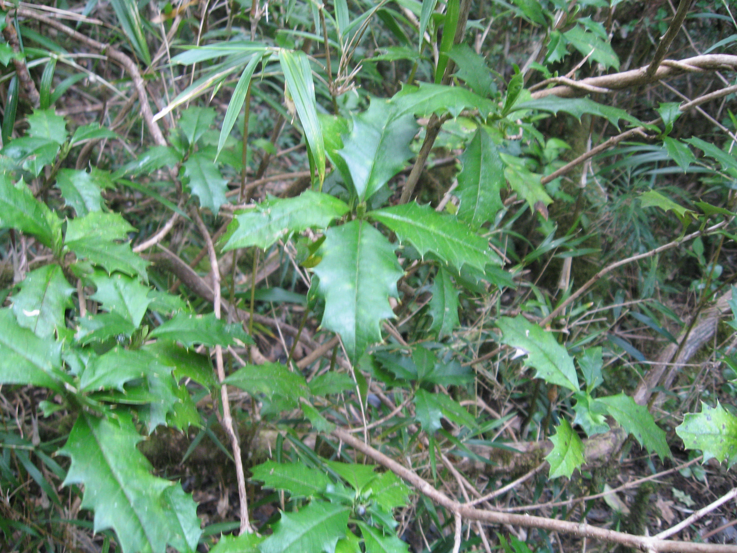 Hojas de taique (Desfontainia spinosa) en el parque Oncol, región de Los Ríos, Chile